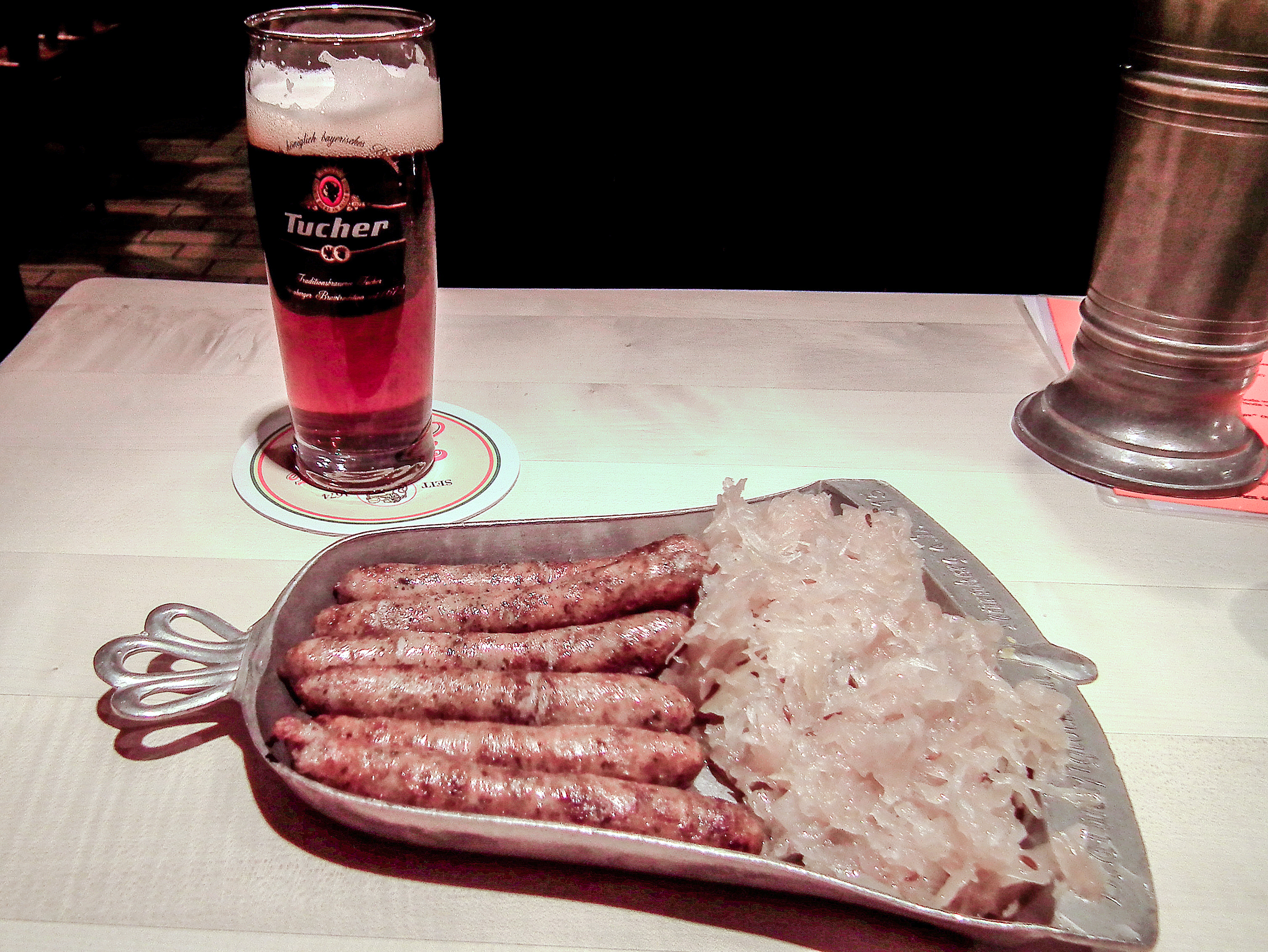 NUREMBERGER PORK SAUSAGES AND TUCHER BEER NUREMBERG OLD TOWN GERMANY APRIL 2012